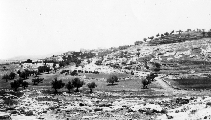 הכפר רנתיס א' אייר תרצ"ב 1932 - חיים ברגר